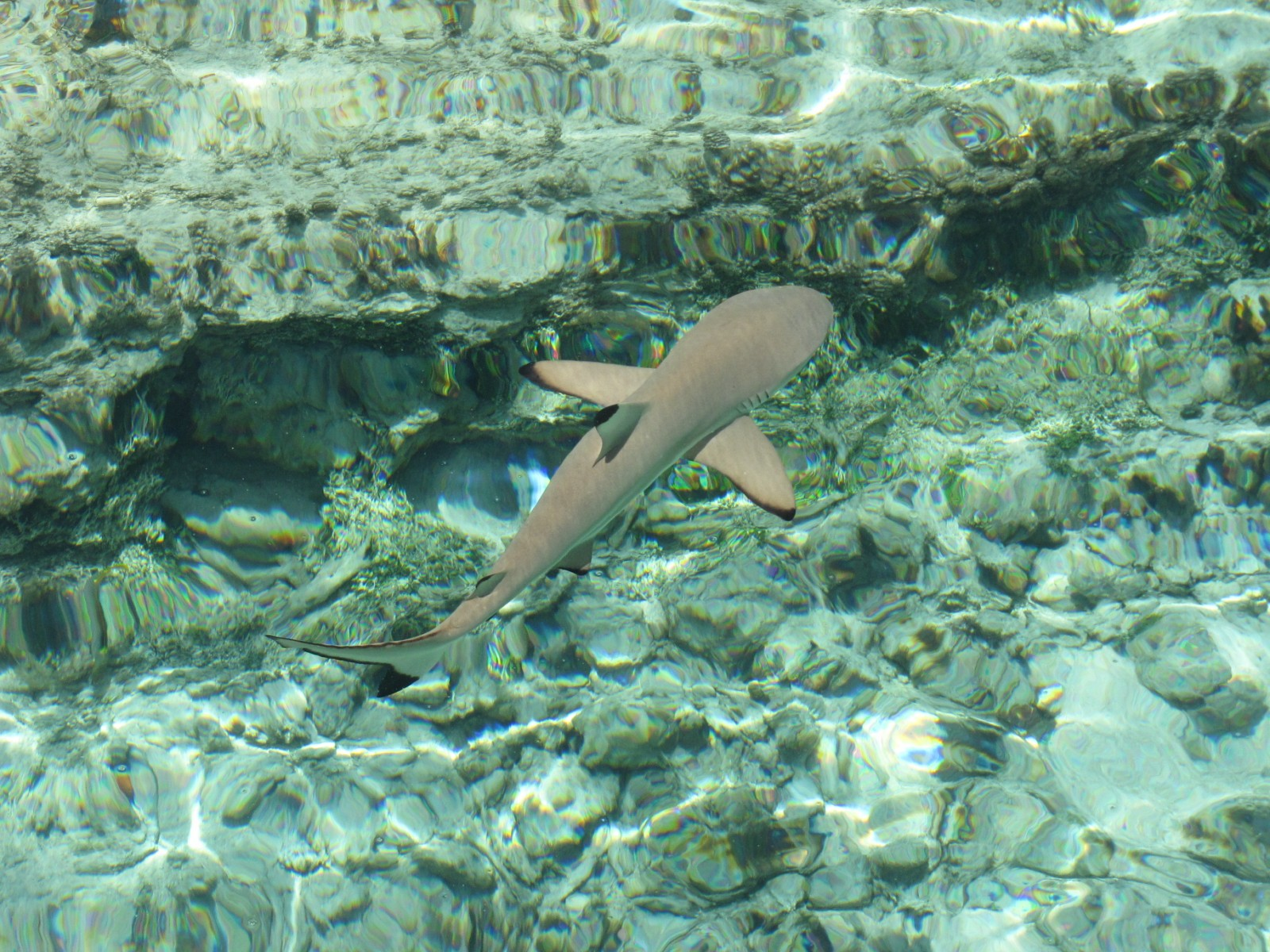 requin pointe noire au Tuamotu